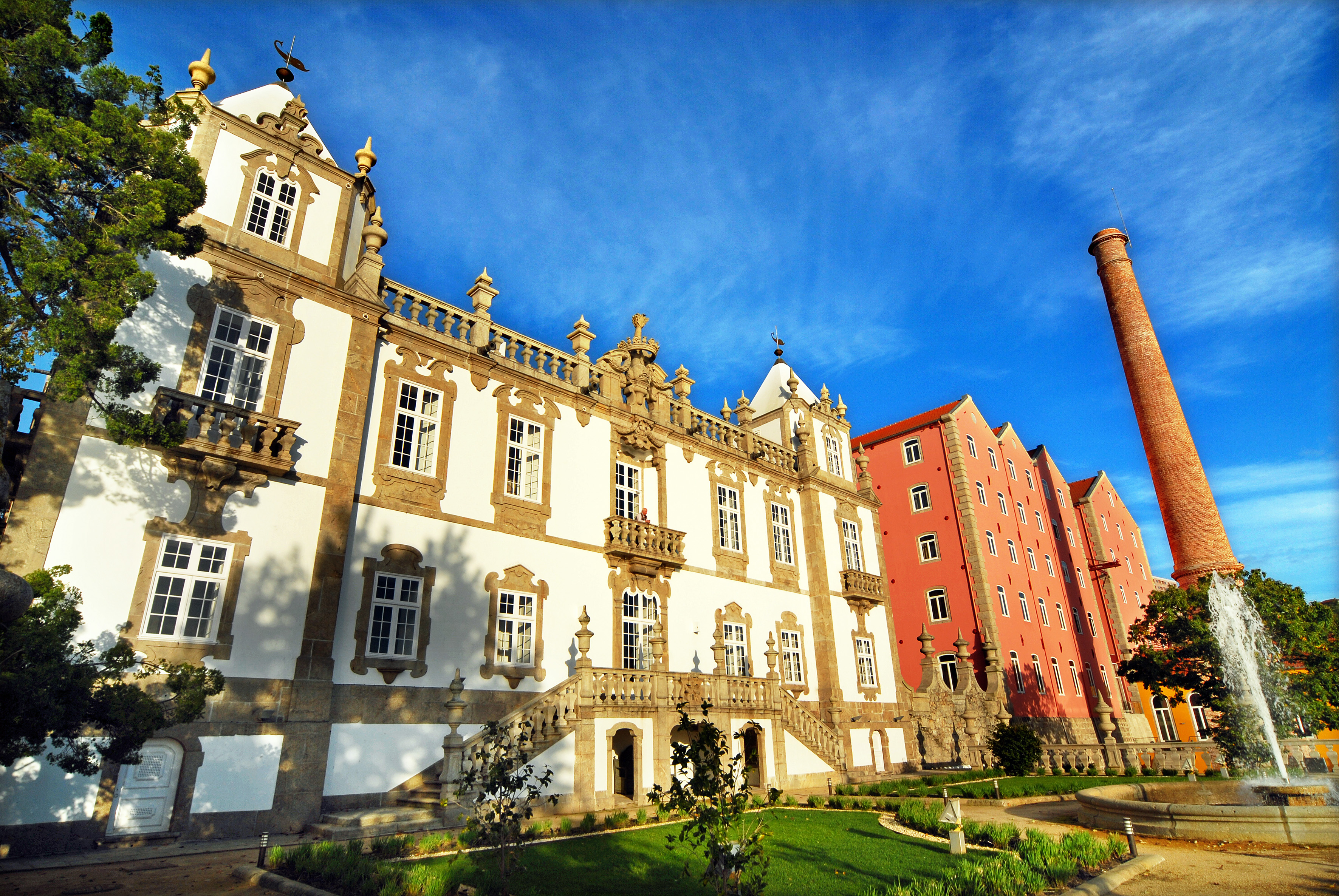 Pousada do Palácio do Freixo This file was uploaded for Wiki Loves Monuments in Portugal with the unique identifier 70403.